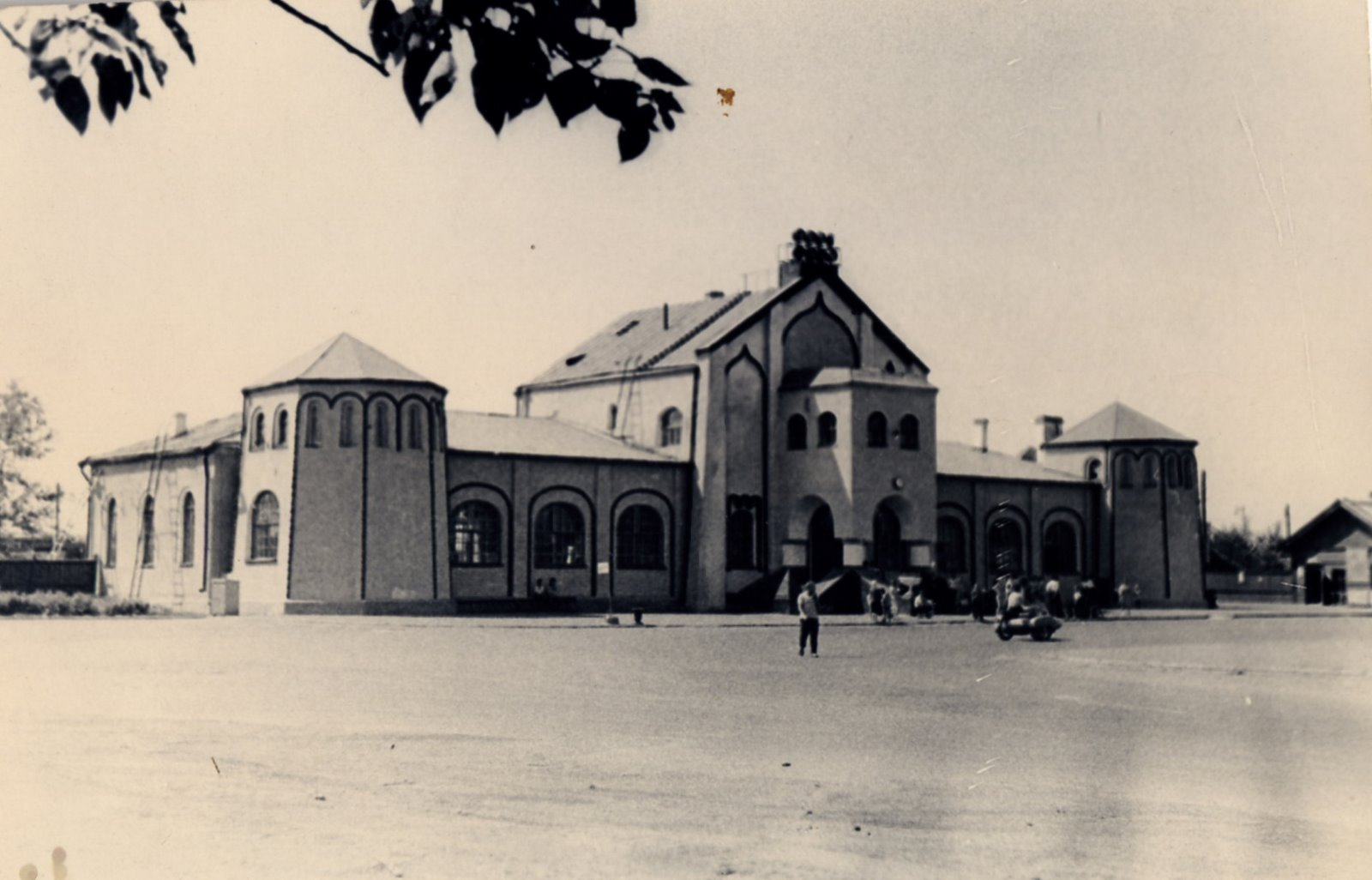 Железнодорожный вокзал. Муром